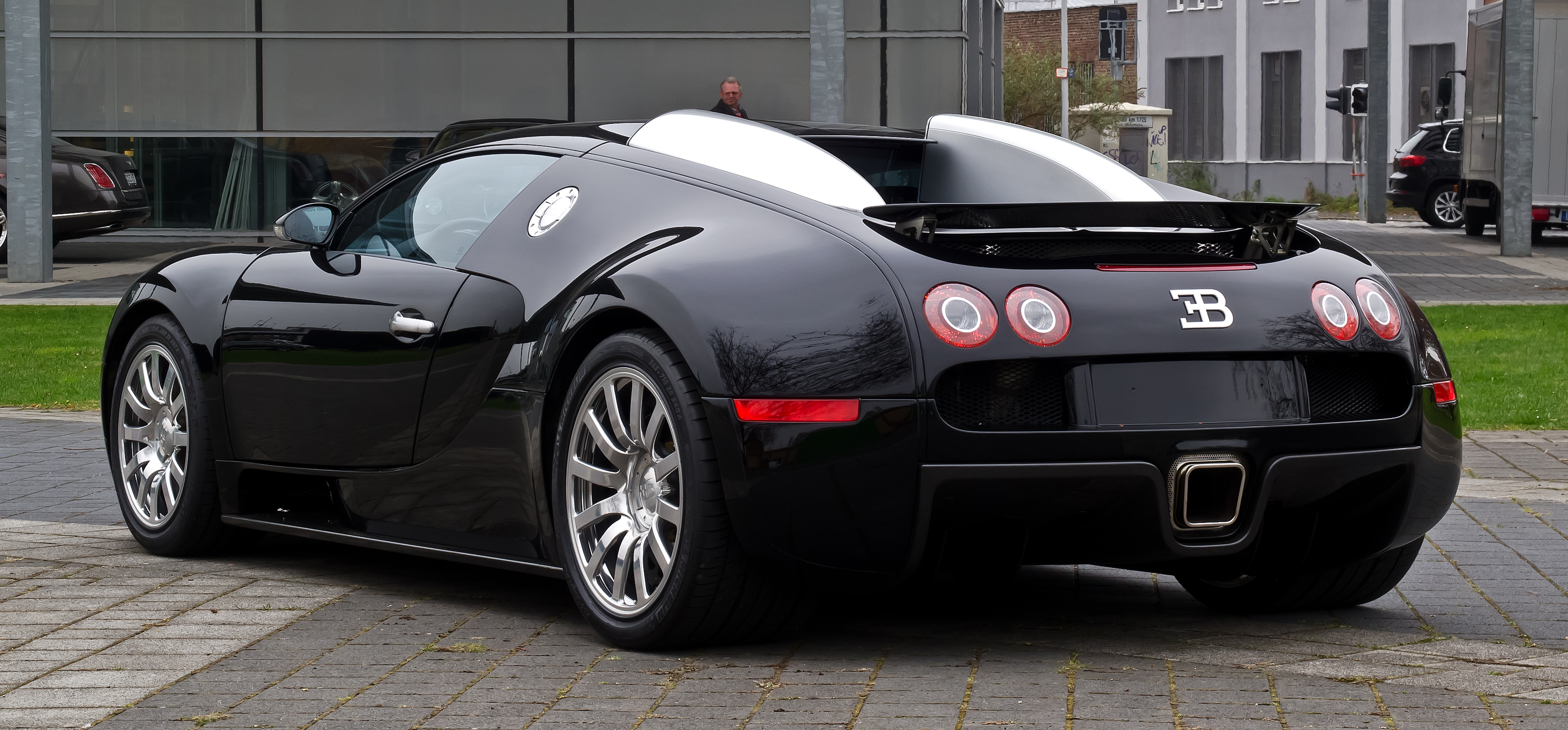 Bugatti Veyron 16.4